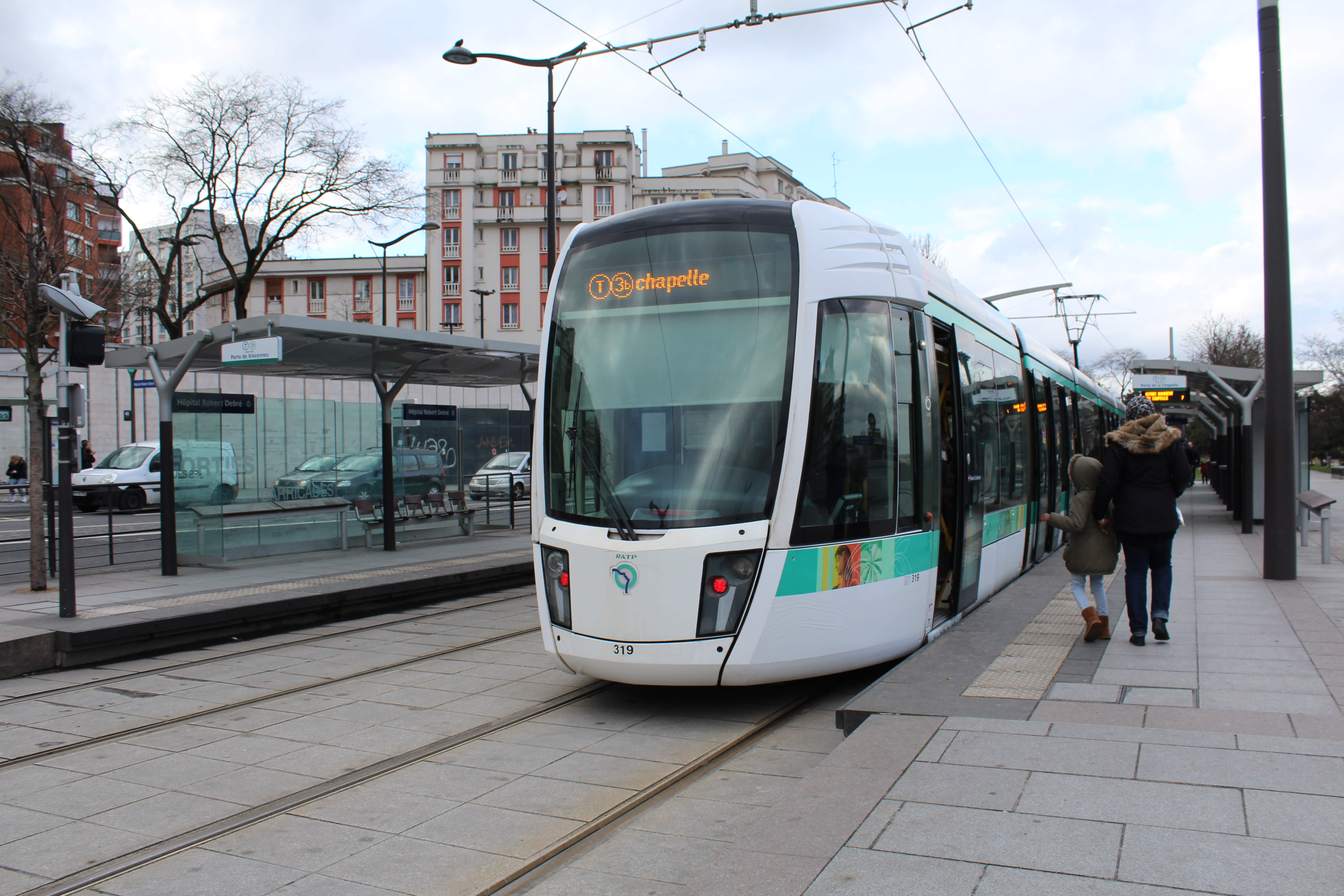 Station de tramway Hôpital Robert-Debré de la ligne 3b du tramway d'Île-de-France.